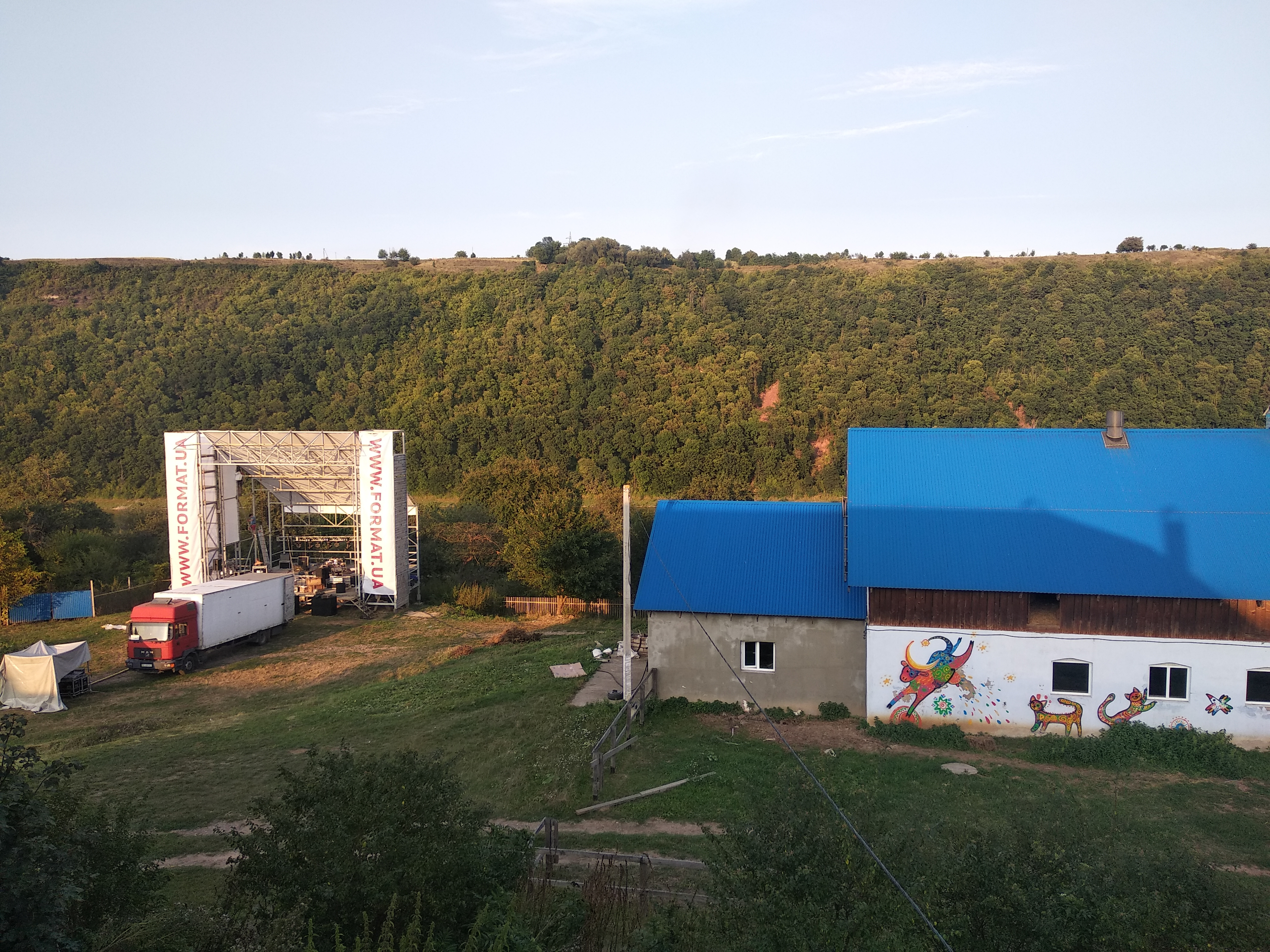 Вид на сцену